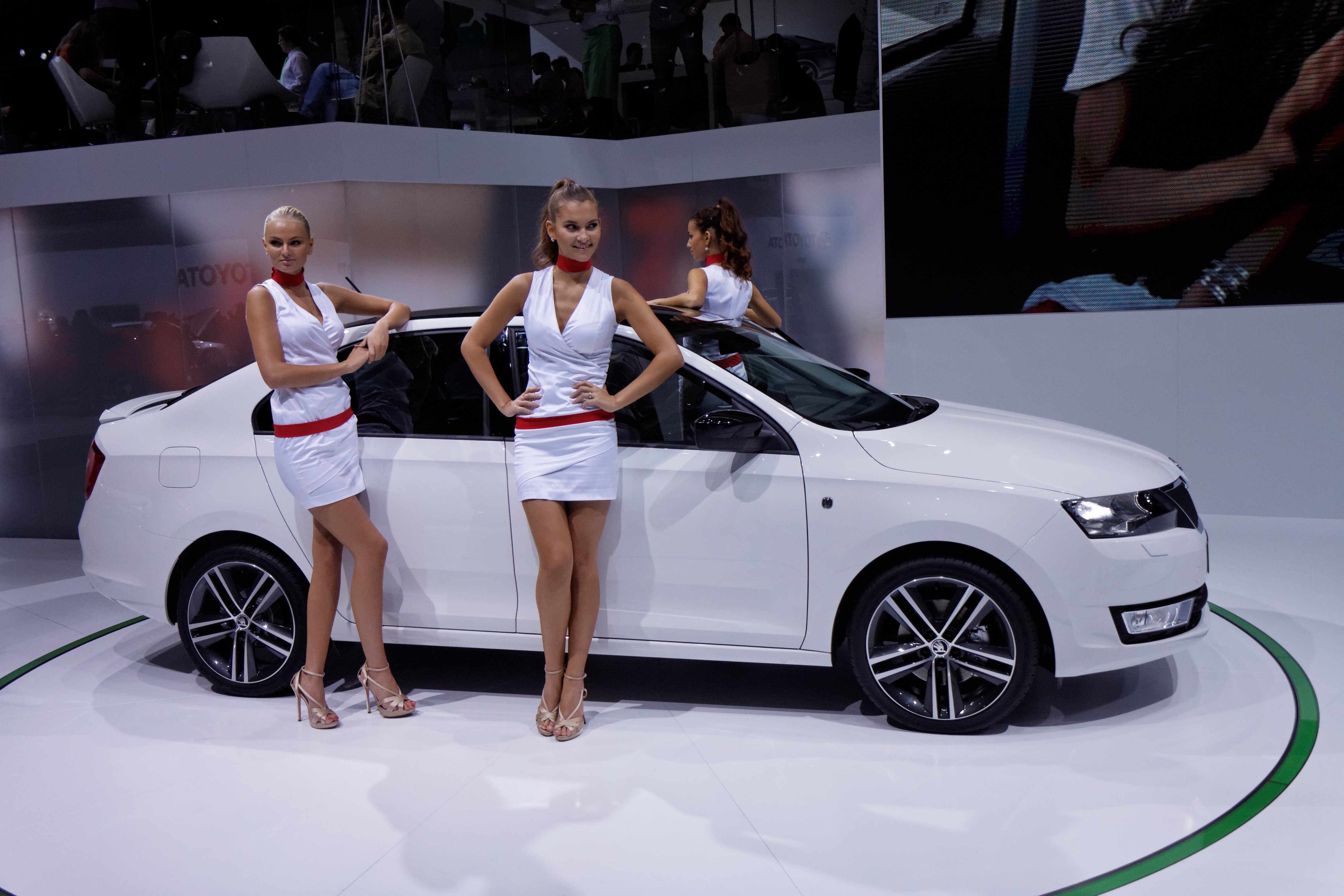 Une Škoda Rapid présentée lors du Mondial de l'Automobile de Paris 2012.